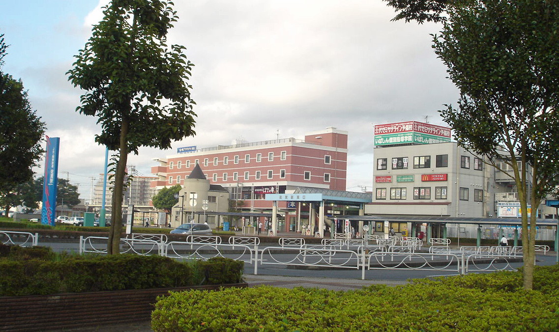 佐貫駅東口